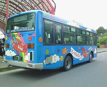 十和田観光電鉄バス ビードルくんバス（いすゞ・エルガミオ：KK-LR233J1）：リア側 ミス・ビードルドーム付近にて